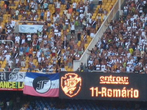 Romario as substitute in match Vasco-Flamengo feb 2007